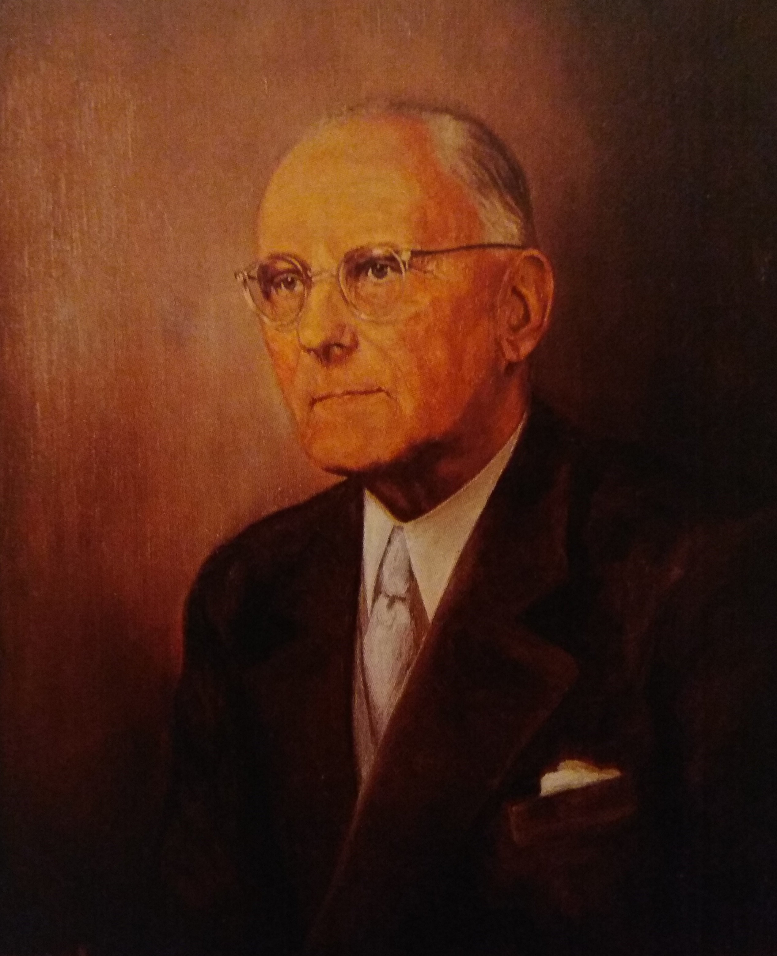 Anonym: Porträt von Erich Gaertner.